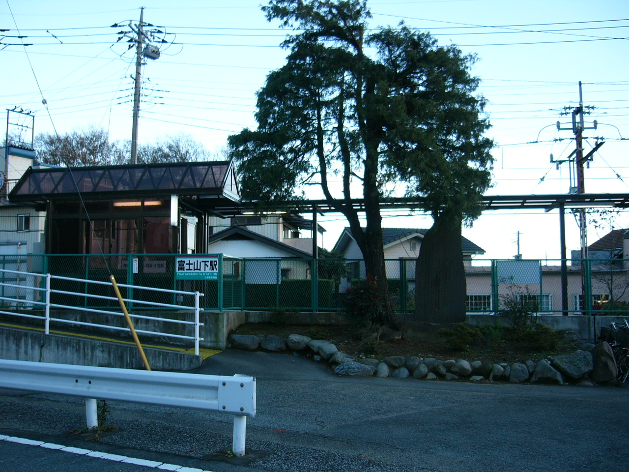 Fujiyamashita Station